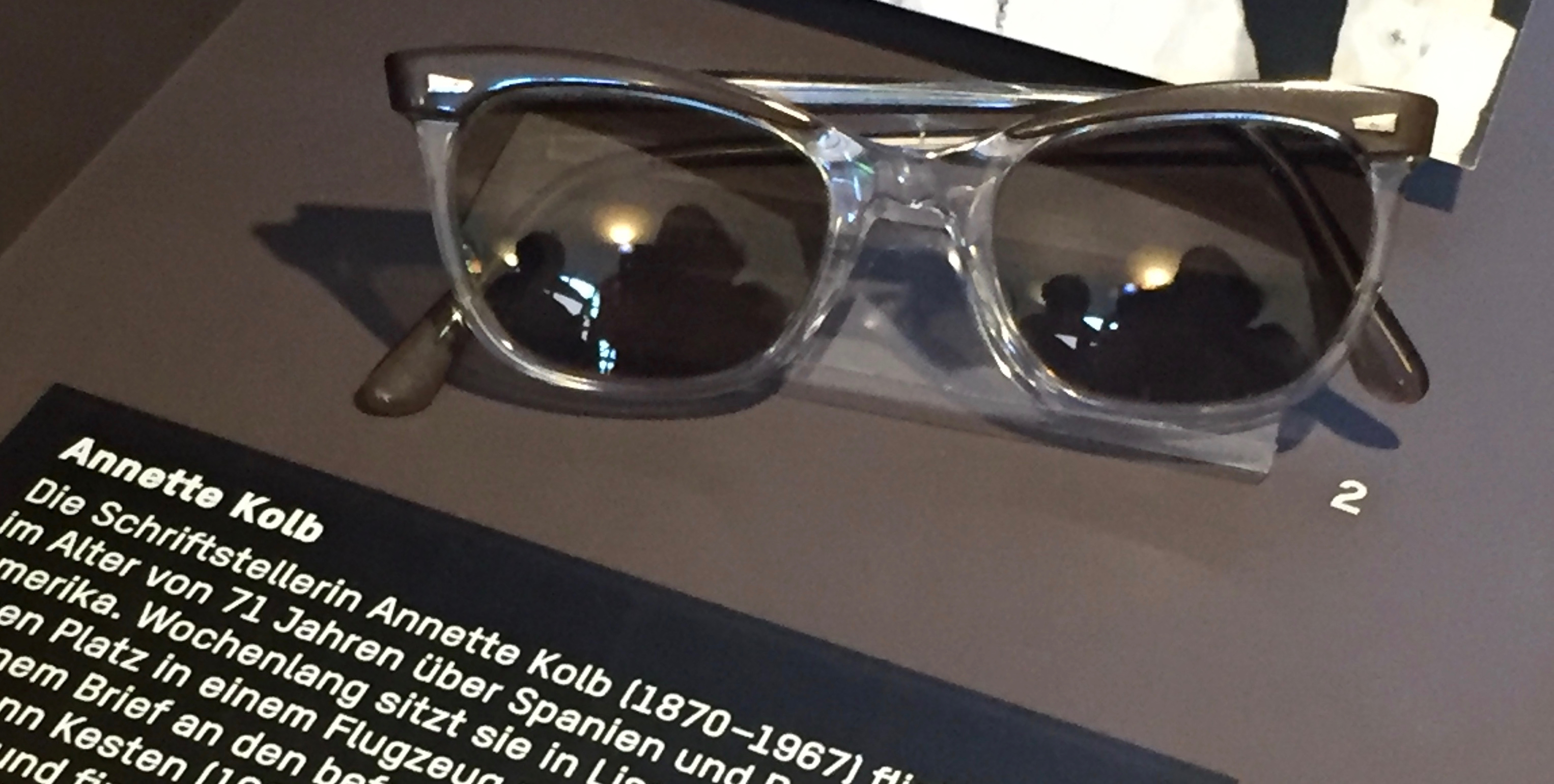 Brille von Annette Kolb aus dem Nachlass, der bei der Monacensia liegt